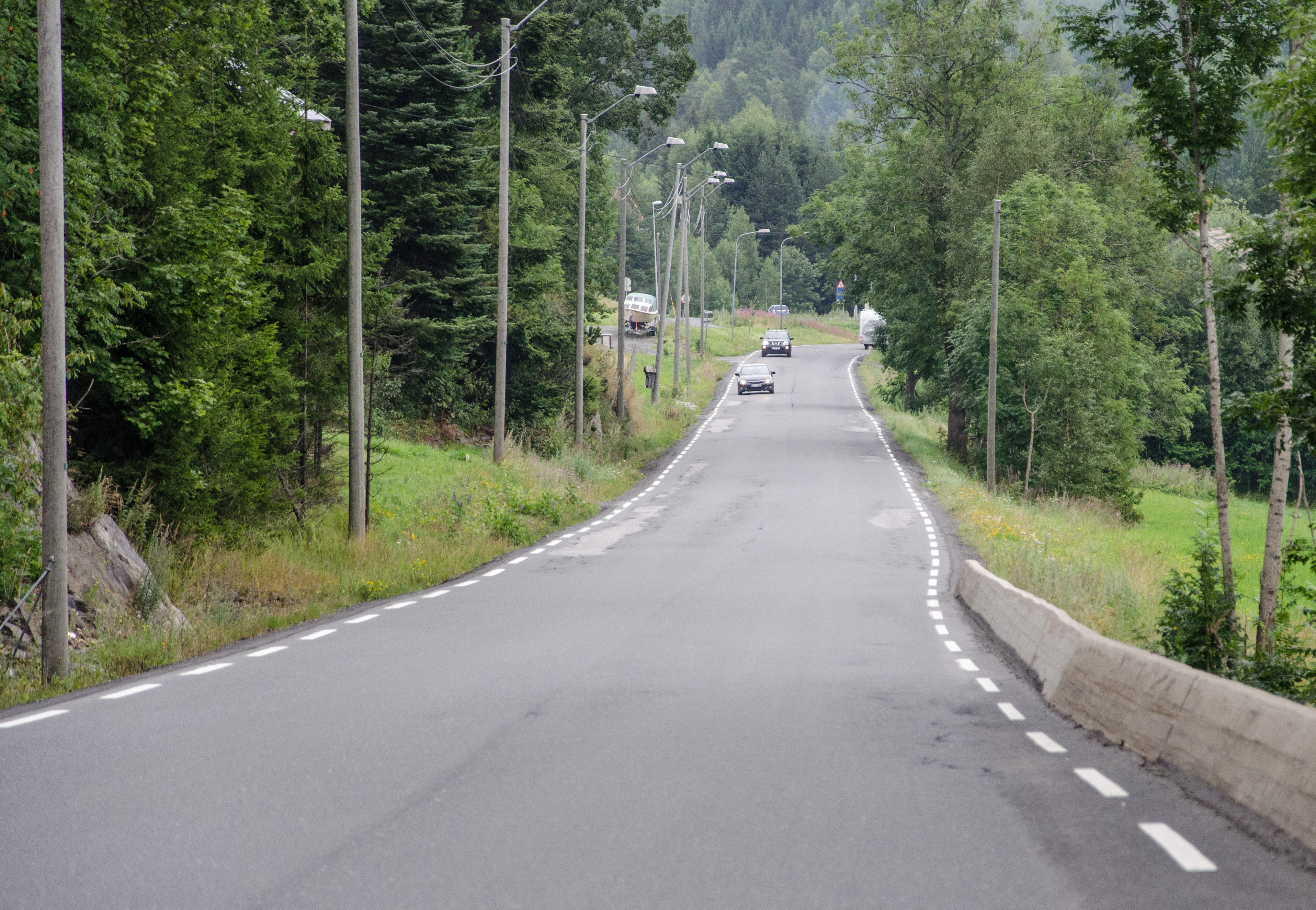 Telemarks fylkesvei 256